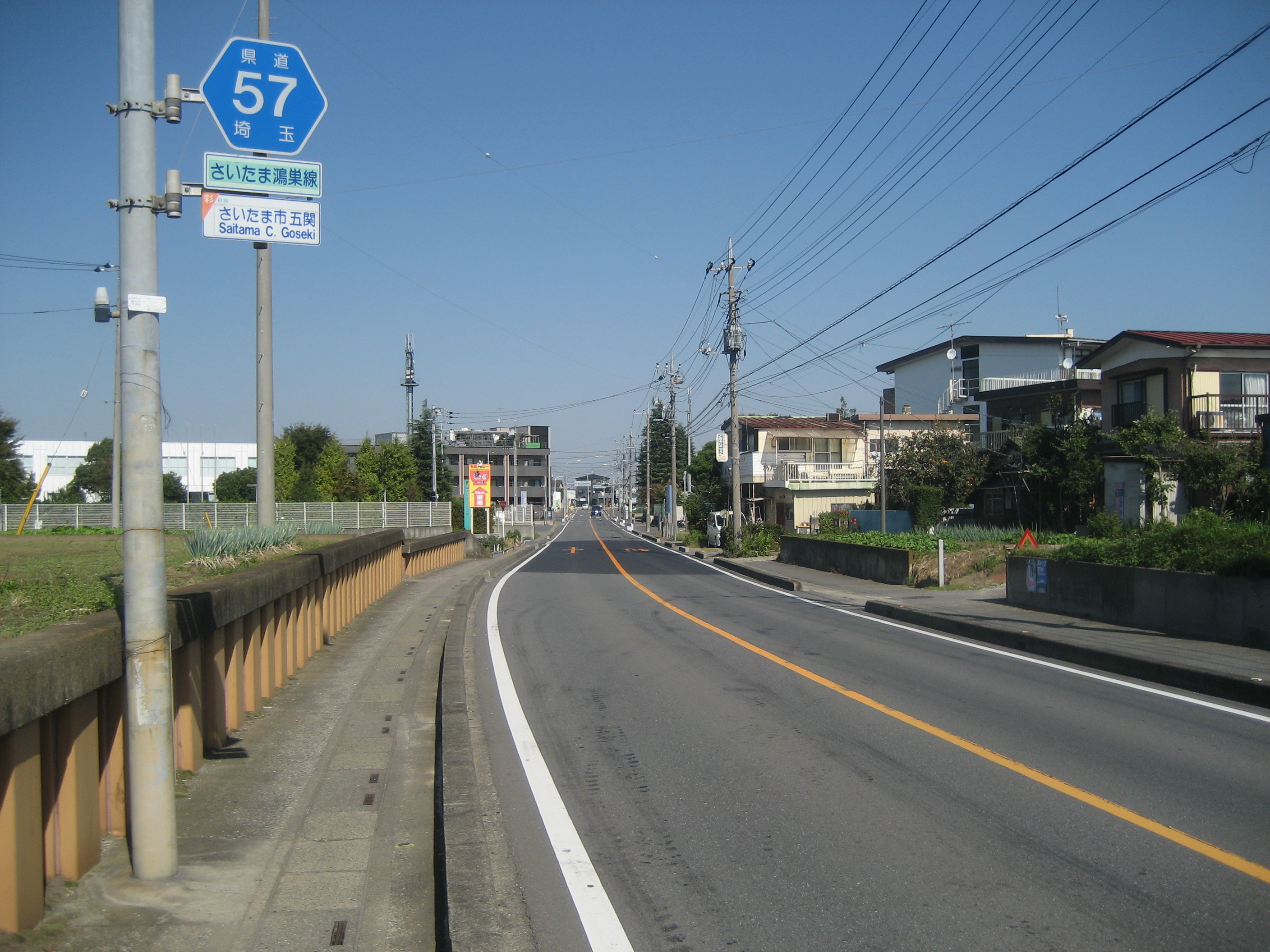 埼玉県道57号線さいたま市桜区五関付近（日進方面を撮影）